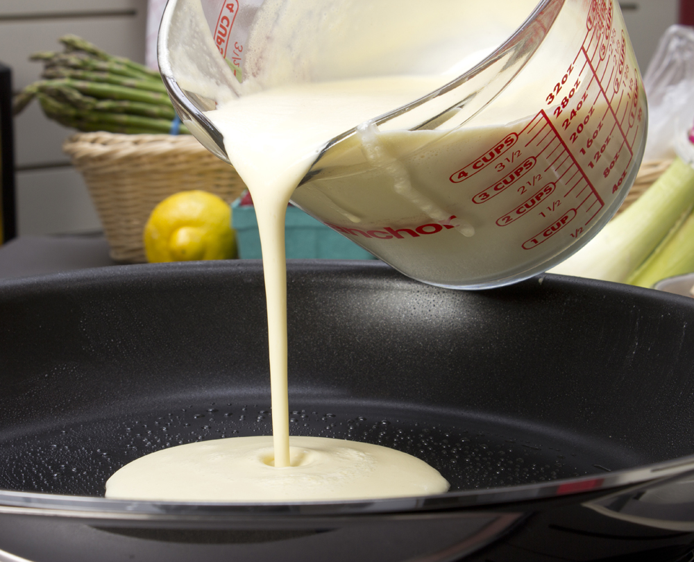 Zubereitung von Crêpes im Haushalt: Portionsweises Einfüllen von dünnflüssigem Crêpeteig in eine leicht gefettete, beschichtete Pfanne.